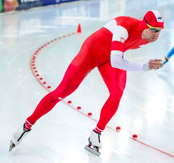 Speedskater